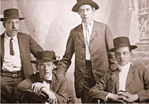 Grupo de irlandeses afincados en Argentina, siglo XIX